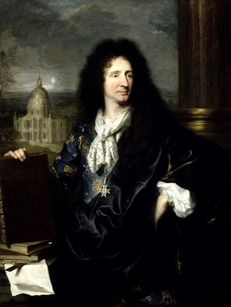 Portrait d'homme, à mi-corps, de trois-quart.